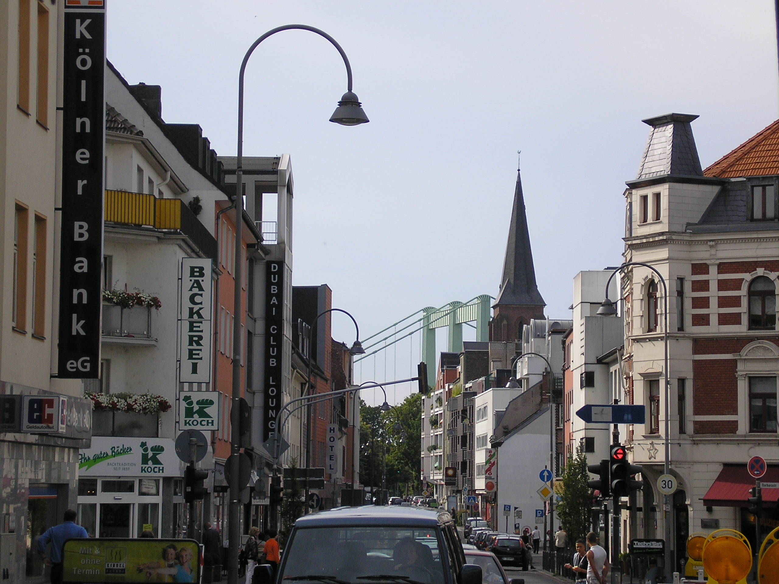 Köln-Rodenkirchen, Hauptstrasse, im Hintergrund die Rodenkirchener Brücke ( BAB 4 ).